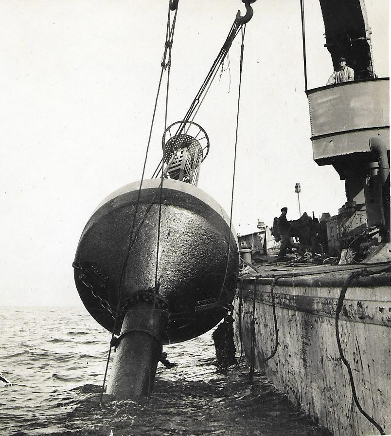 Dépose d'une bouée depuis le baliseur Charles Ribière